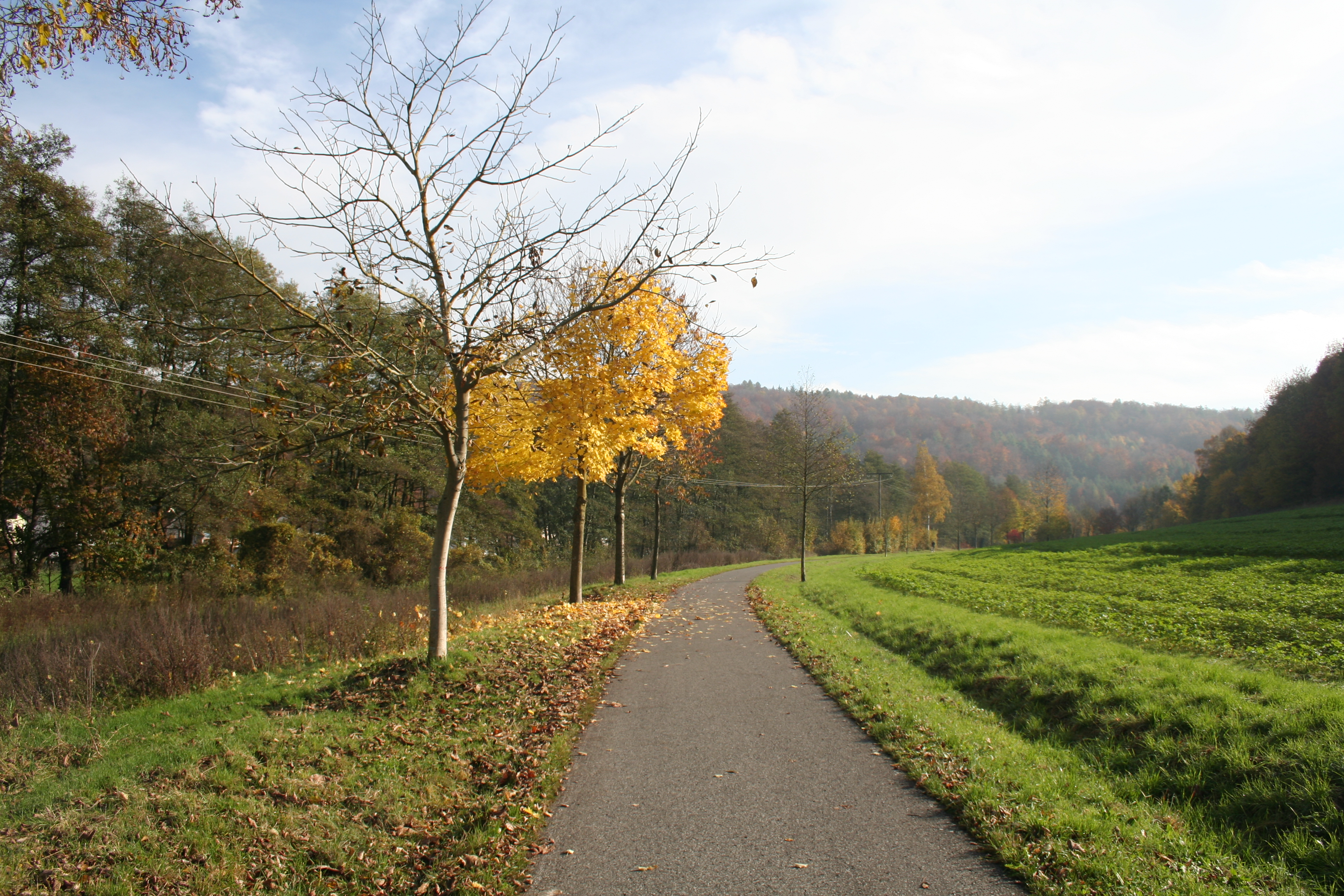 Bahnstrecke Obernburg-Elsenfeld–Heimbuchenthal in heutigem Zustand als Radwanderweg in Höhe Ortsausgang Rück